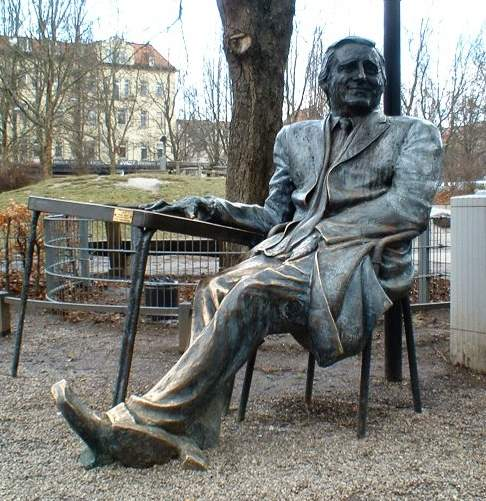 Denkmal für Monaco Franze (Helmut Fischer) an der Münchener Freiheit, selbst fotografiert, GNU-FDL